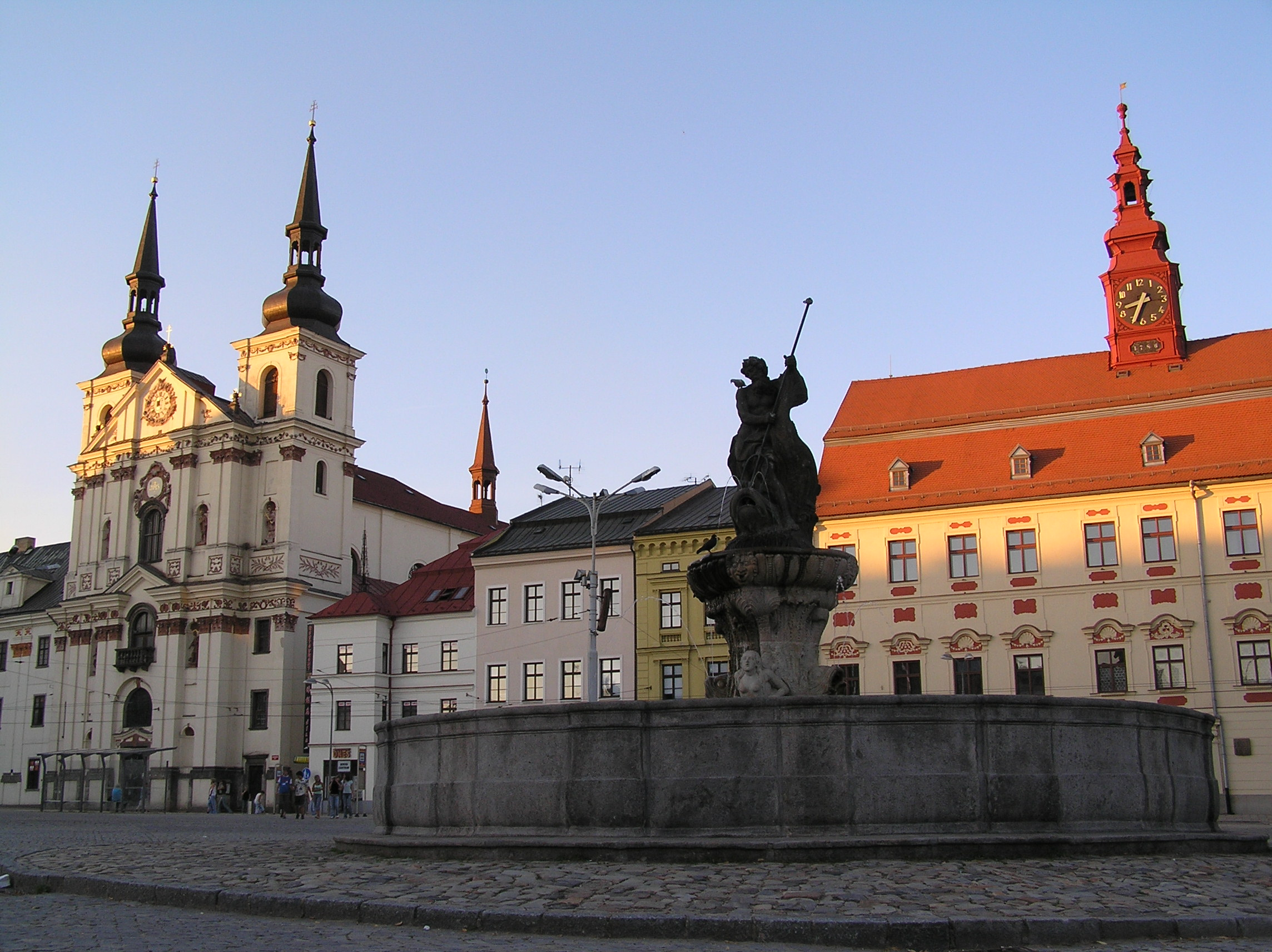 Kašna Neptunova (Jihlava), Masarykovo nám., Jihlava